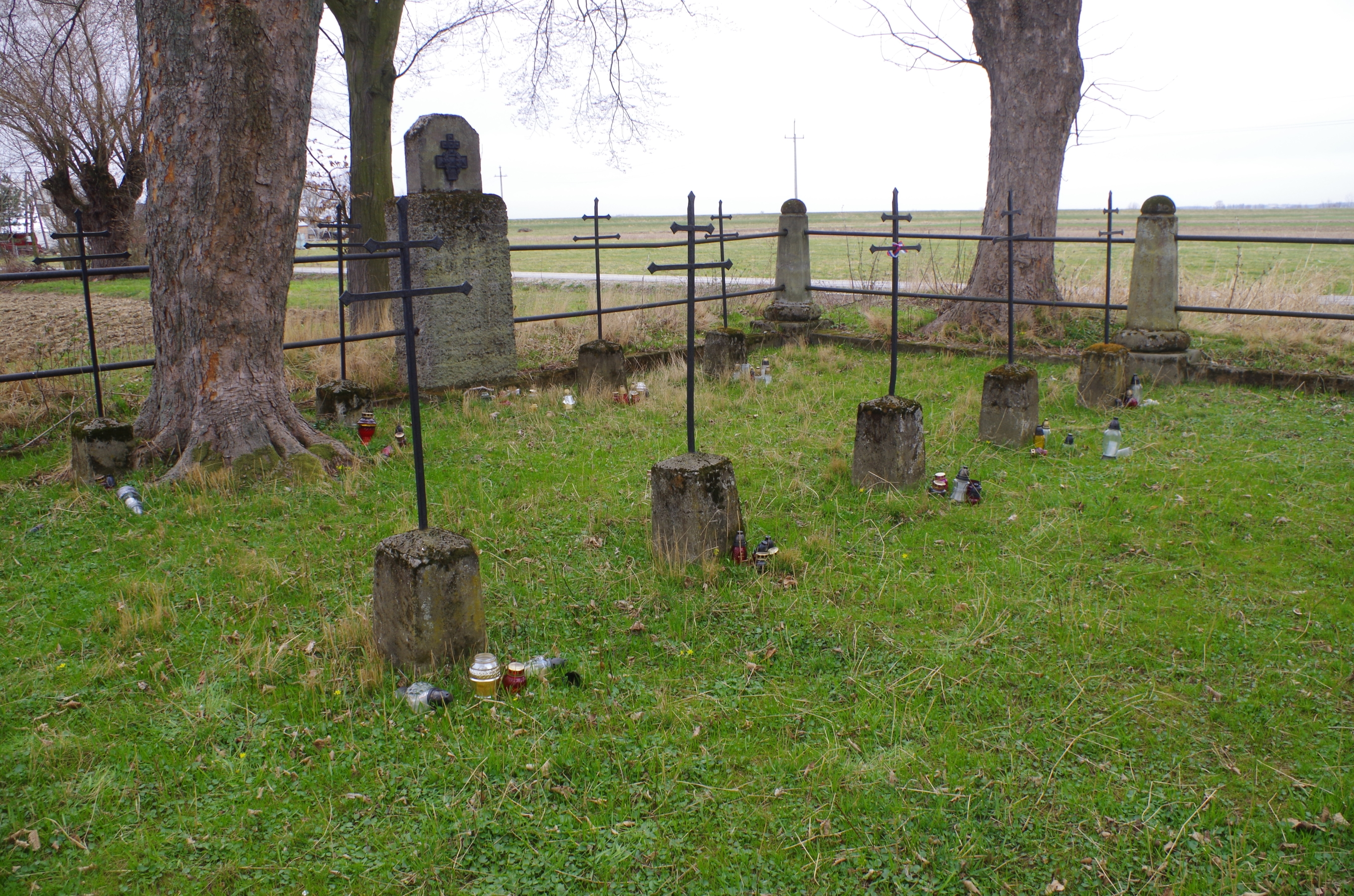 Cmentarz wojenny nr 317 – Bogucice